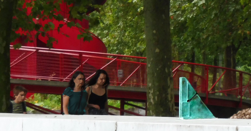 Jean-Max Albert, Sculpture de visée V, Parc de La Villette, Paris, 1986